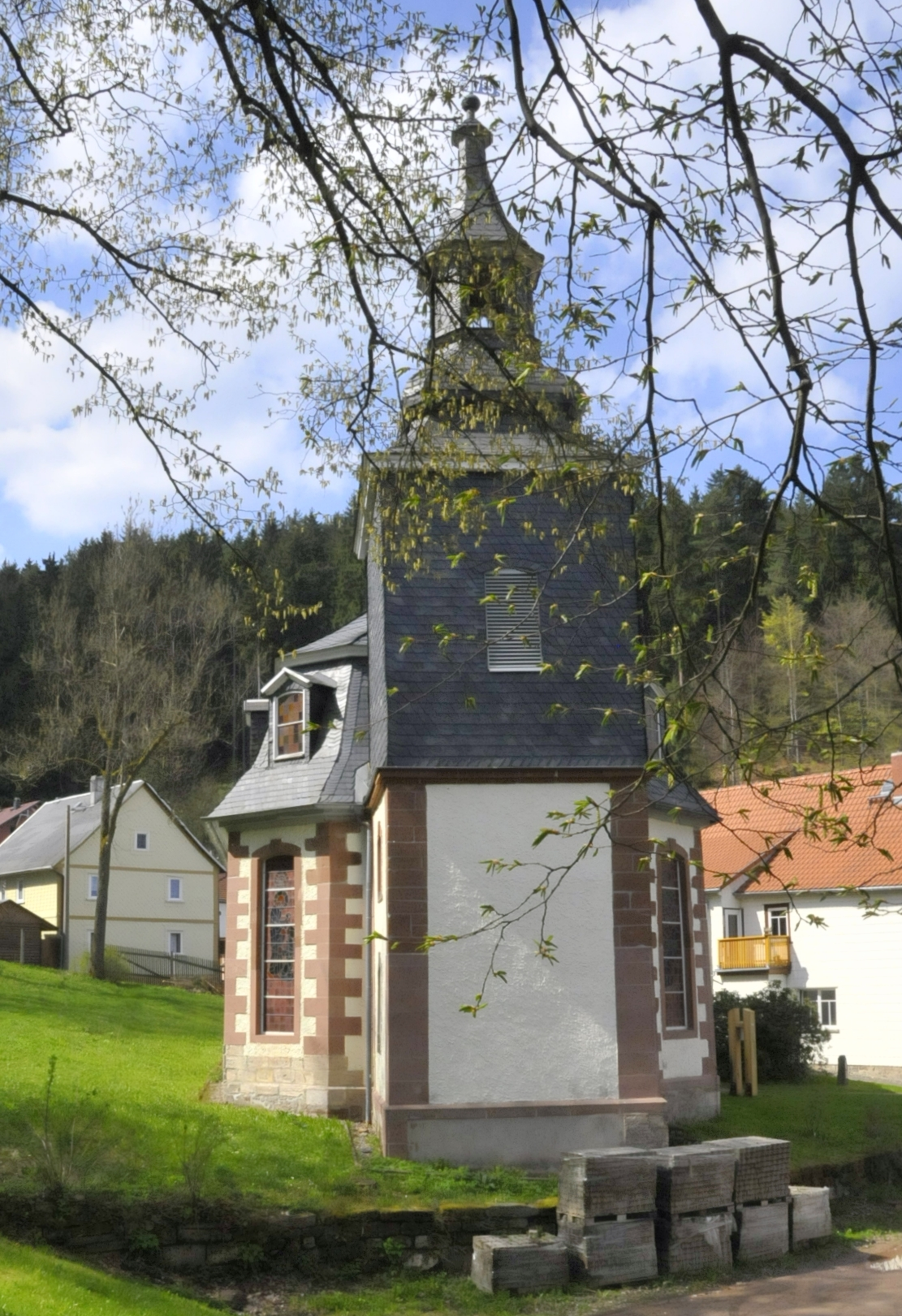 Elgersburg, Kirche St. Nikolaus aus Nordost